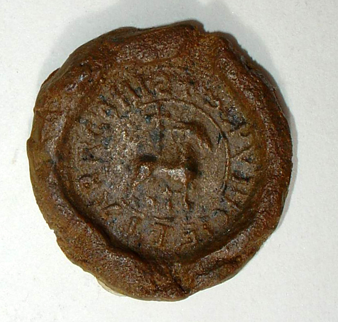 Segell del mestre de la provincia catalanoaragonesa del Temple, s. XIII, (Fot. J. Fuguet)